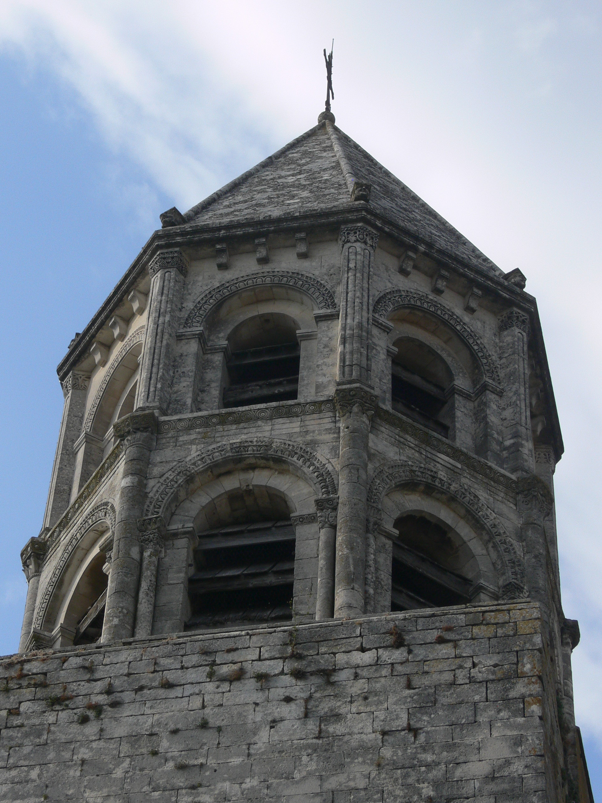 église Saint-Michel de La Garde-Adhémar